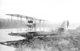 CAMS type 31 photographié devant la Seine à Triel-sur-Seine. (Cliché Musée de l’Air).